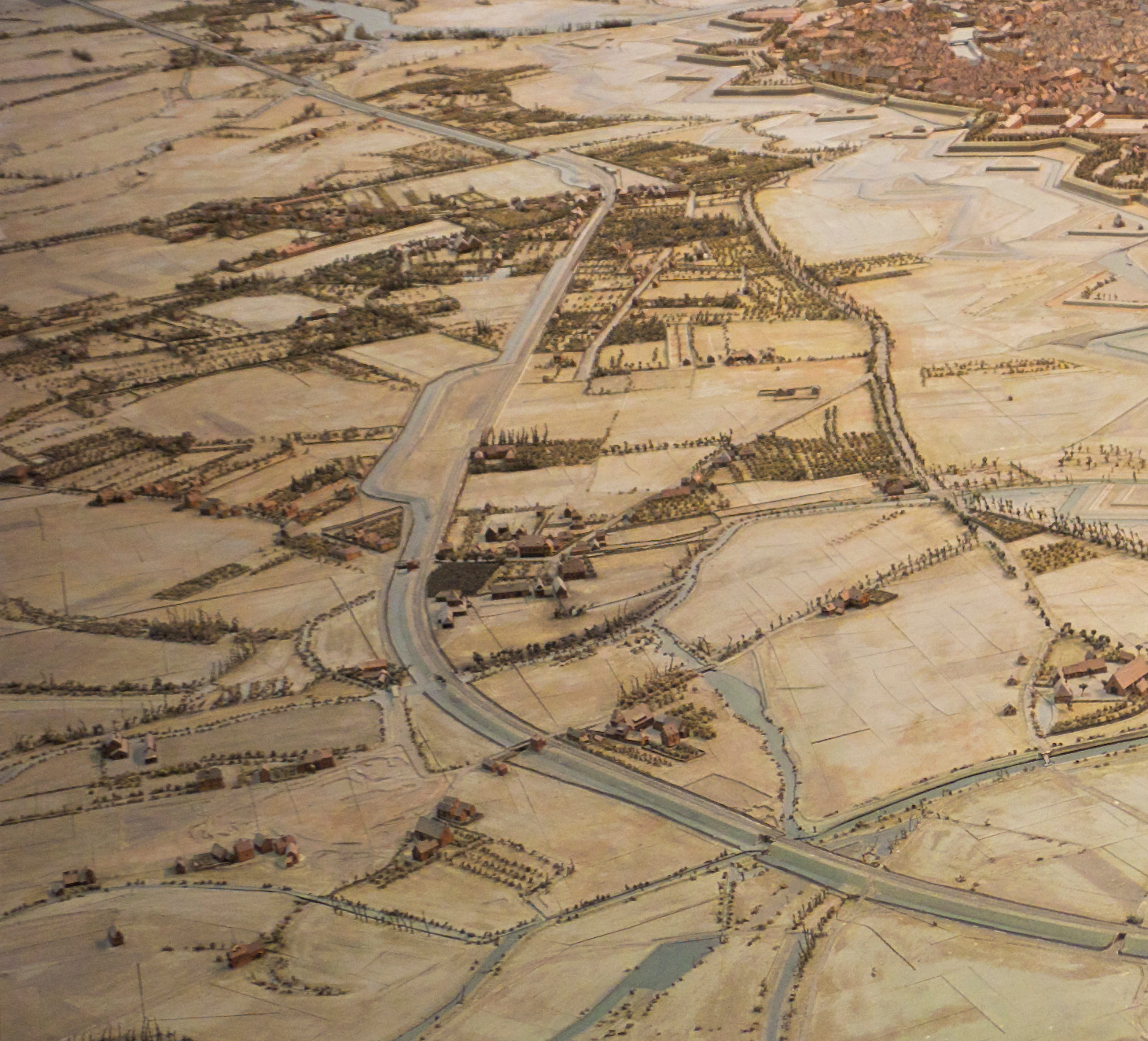 Plan-relief de Strasbourg en 1863. Plan-relief construit de 1830 à 1836 sous la direction de Boitard et actualisé de 1852 à 1863. Image centrée sur le nord de Neudorf (fossé Riepberg) Échelle 1/600e